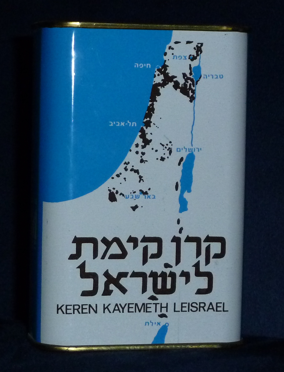 הקופסה הכחולה 1985